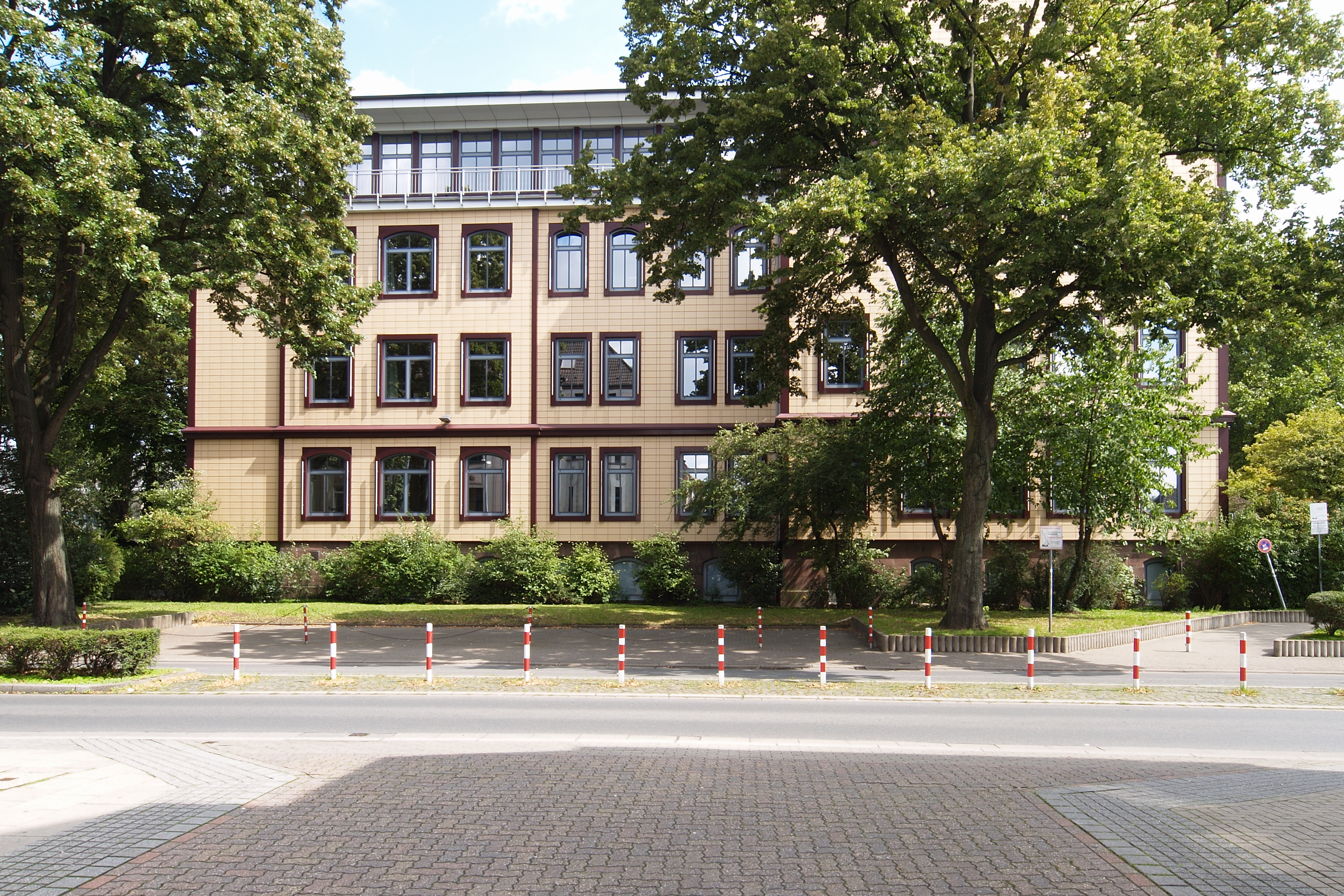 Gebäude das Haranni-Gymnasiums in Herne-Mitte, Ansicht von der Heinrichstraße (Westen)